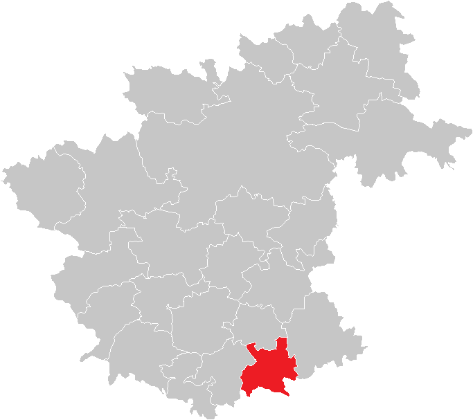 Bezirk Zwettl